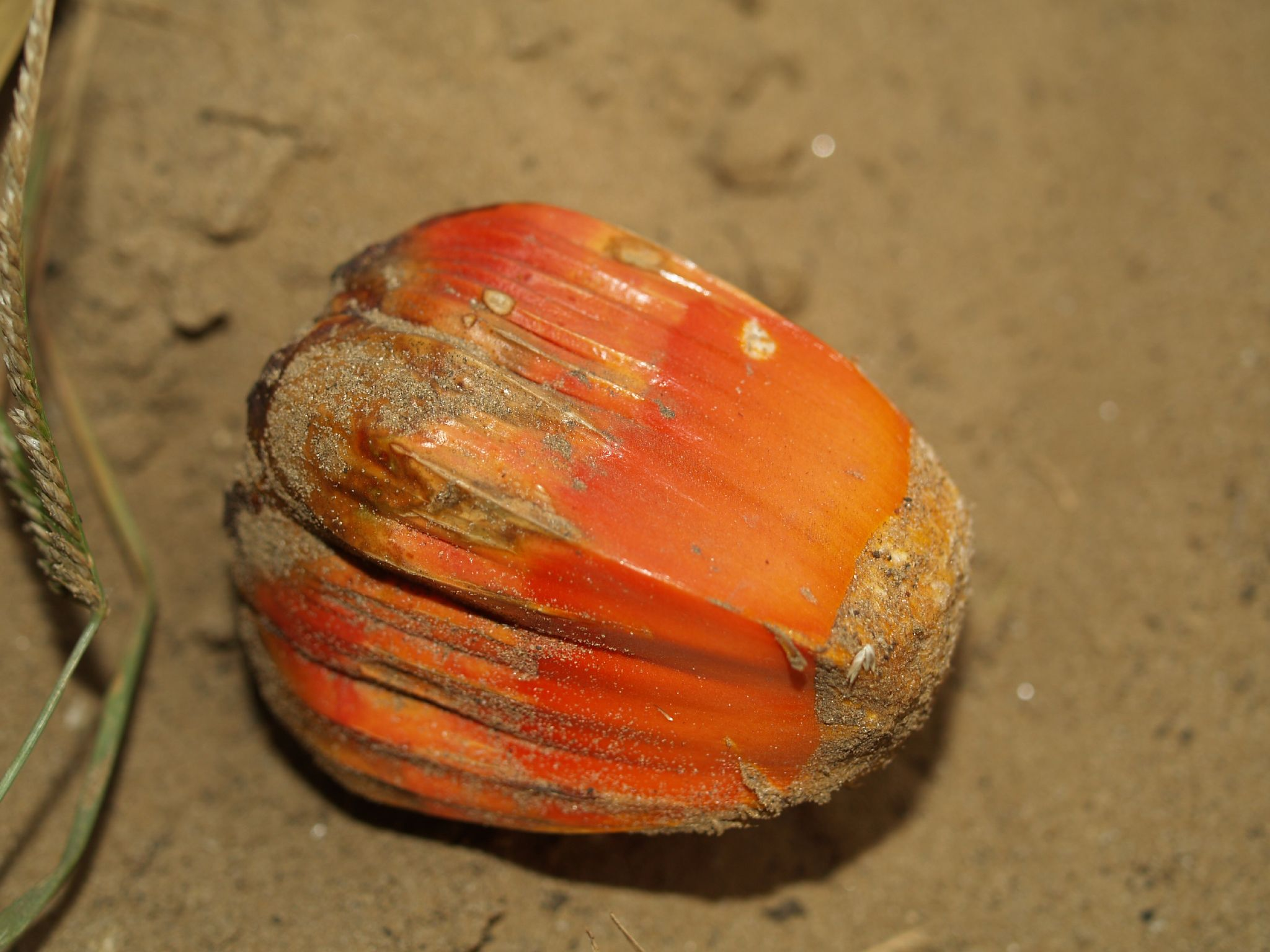 Pandanus spiralis fruit